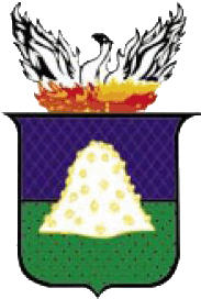 Brasão do município de Cuiabá. Coat of arms of a municipality of Cuiabá.